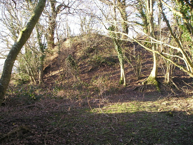 Pencastell motte